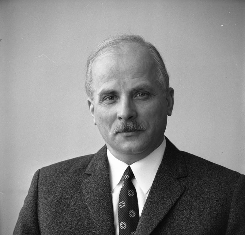 Porträt Staatssekretär Dr. Udo Hein (wirtschaftliche Zusammenarbeit)